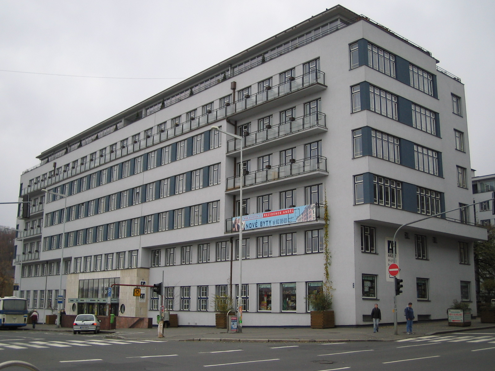 Ženské domovy v Praze 5 na Smíchově.